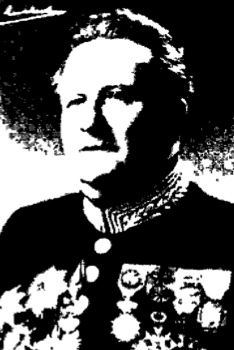 Jef Vandemeulebroek, bourgmestre de Bruxelles de 1939 à 1956